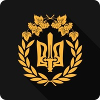 Флаг Народного Фронта Полтавщины